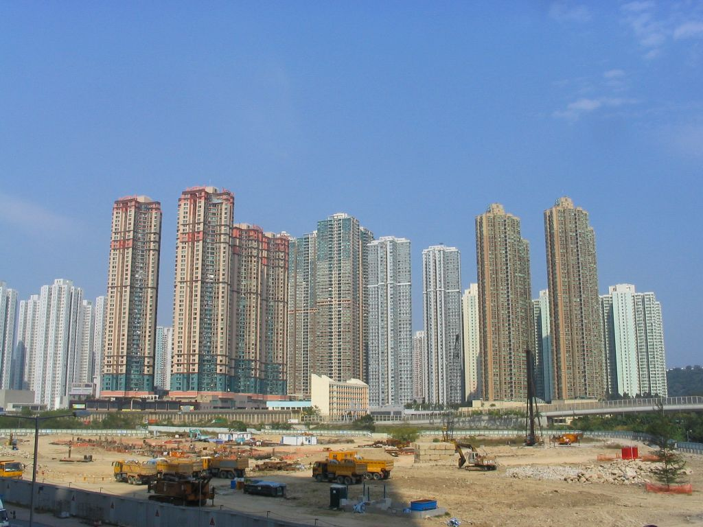 坑口 Hang Hau